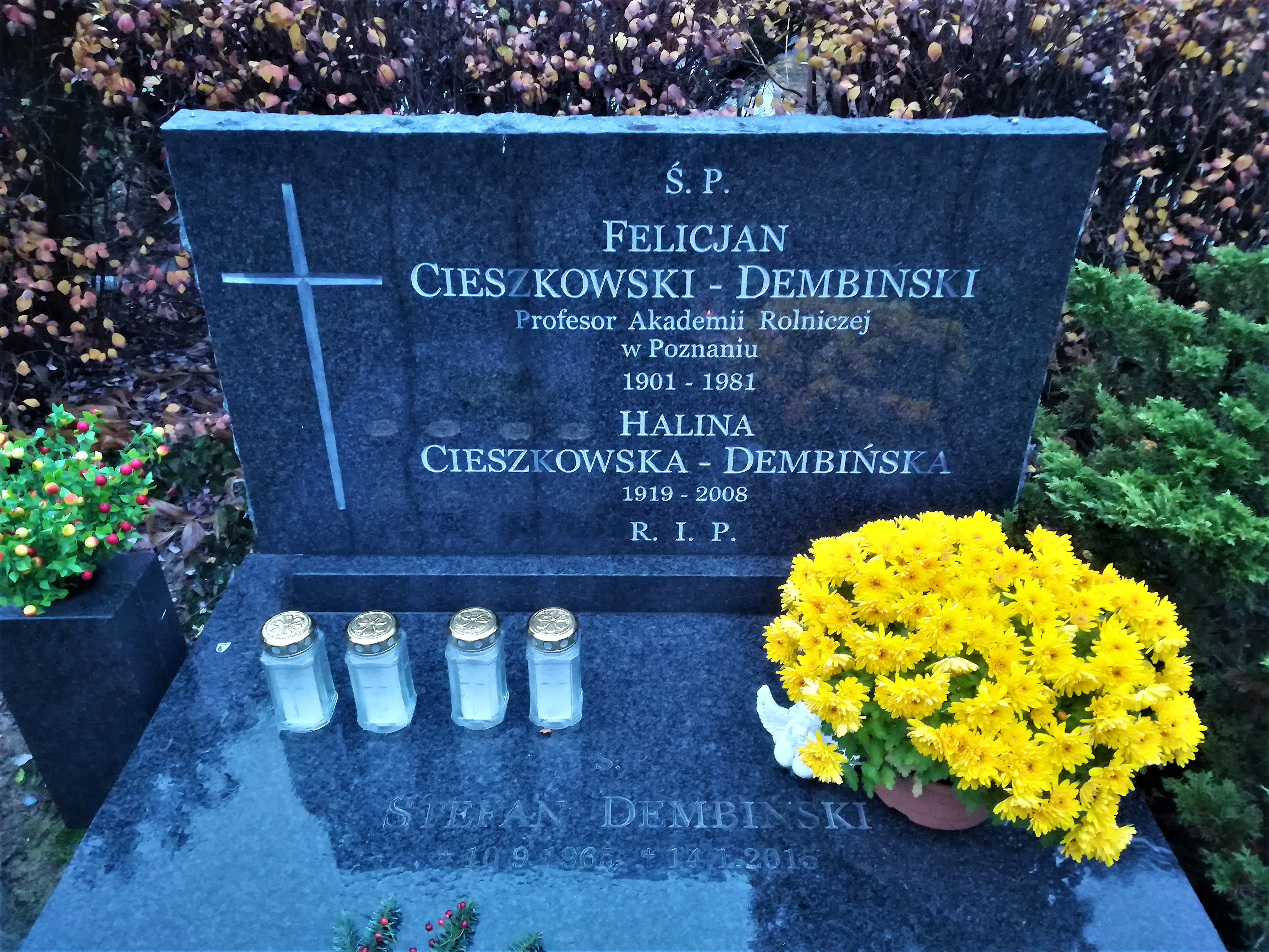 Cmentarz junikowski w Poznaniu. Grób człowieka zasłużonego dla Polski.